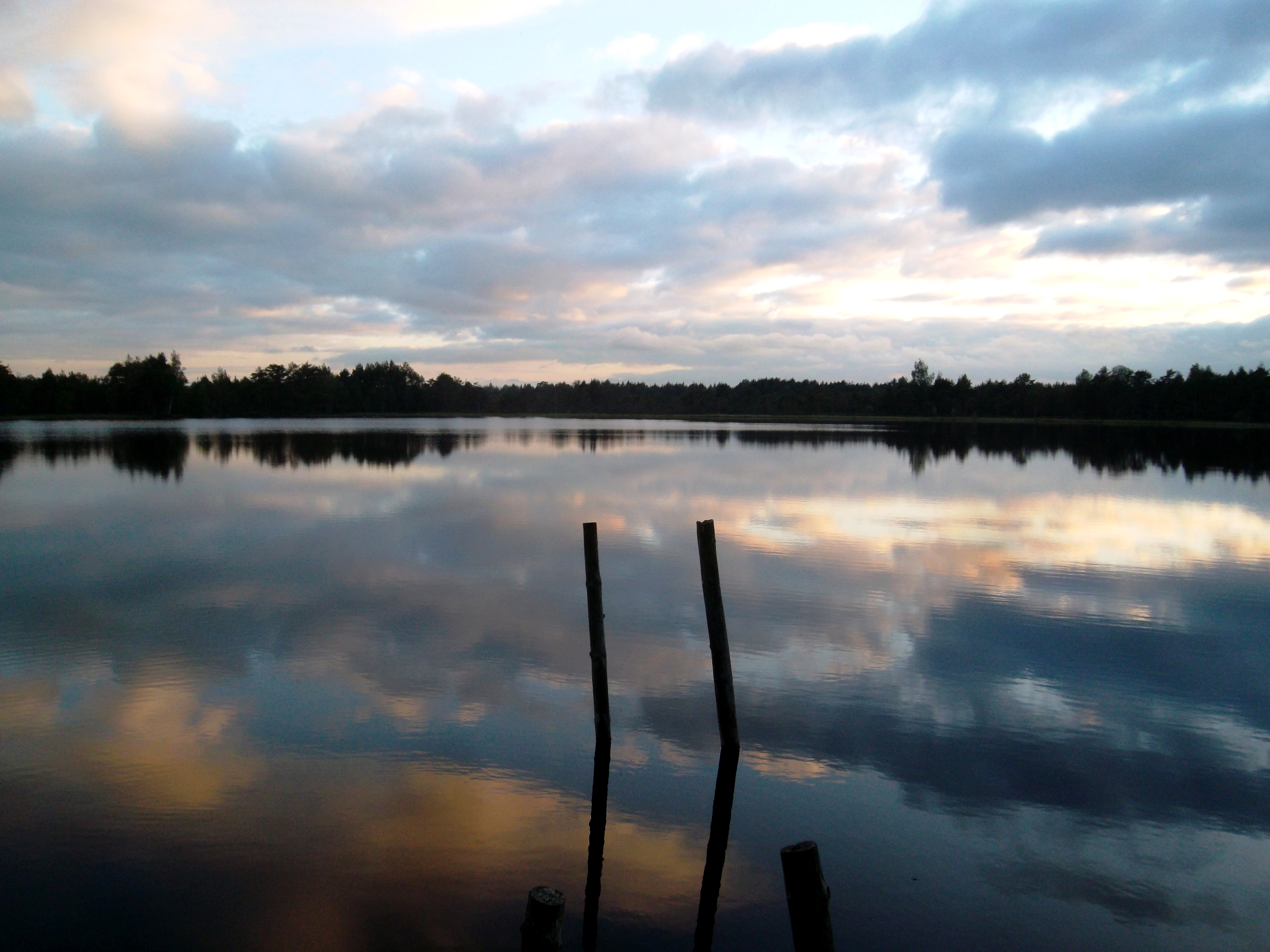 Озеро Кыннуярв.